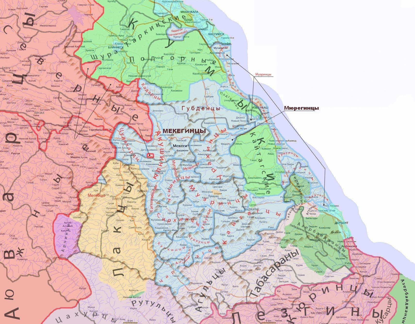 Этническая карта Дагестана